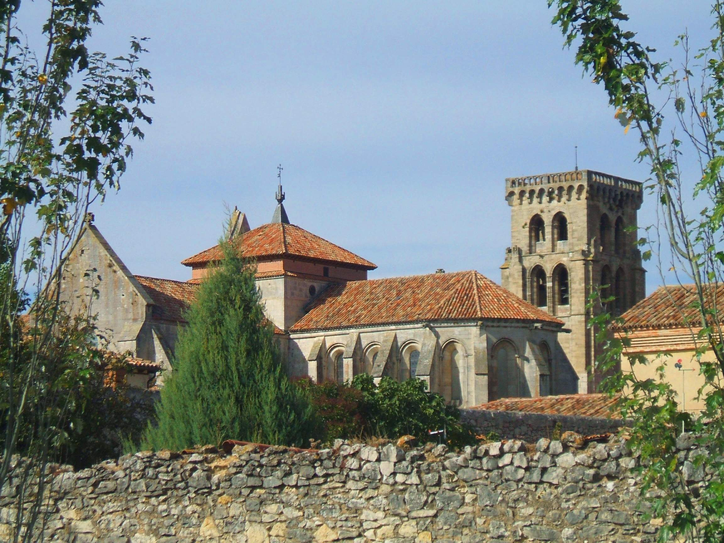 Monasterio de Santa María la Real de Las Huelgas (Burgos)